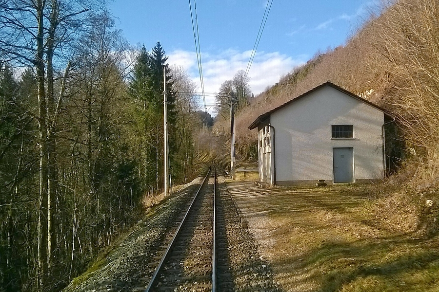 Sous-station électrique et ancienne halte CJ de Sceut (commune de Glovelier) vue depuis l'arrière d'un train CJ